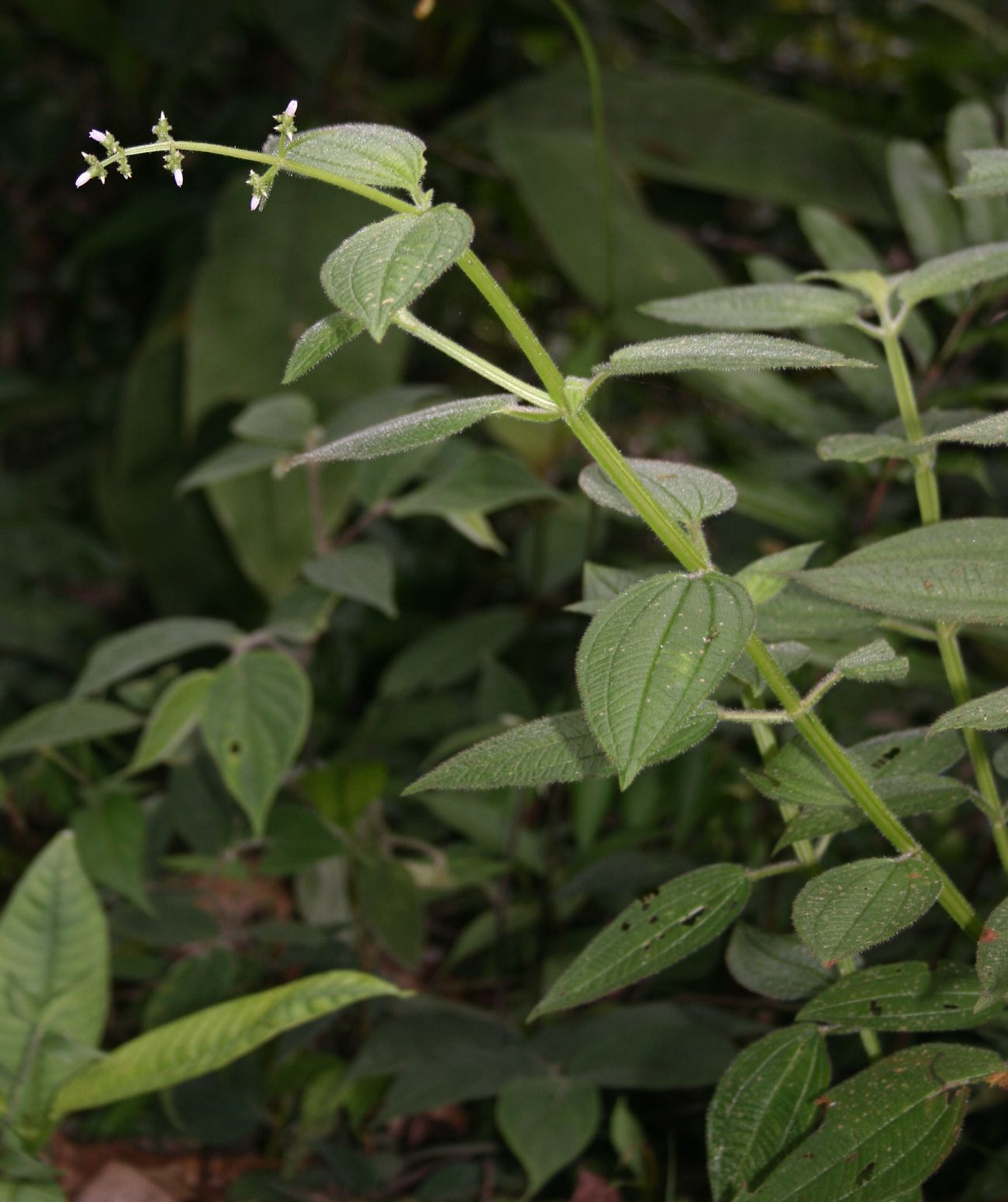 Aciotis rubricaulis, Schwarzmundgewächse (Melastomataceae) - Costa Rica: Prov. Puntarenas, La Gamba NW Golfito, "Fila Trail" NW "Tropenstation La Gamba"/"Estación Biológica La Gamba"